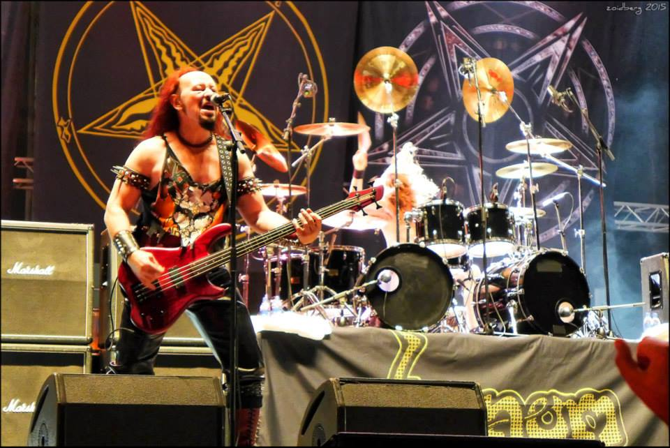 Venom, live RockFest Barcelona, 25/7/2015